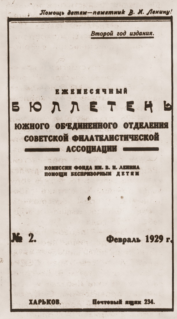 Ежемесячный бюллетень Южного объединённого отделения Советской филателистической ассоциации. Харьков